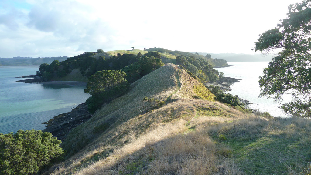 Whakakaiwhara Peninsula